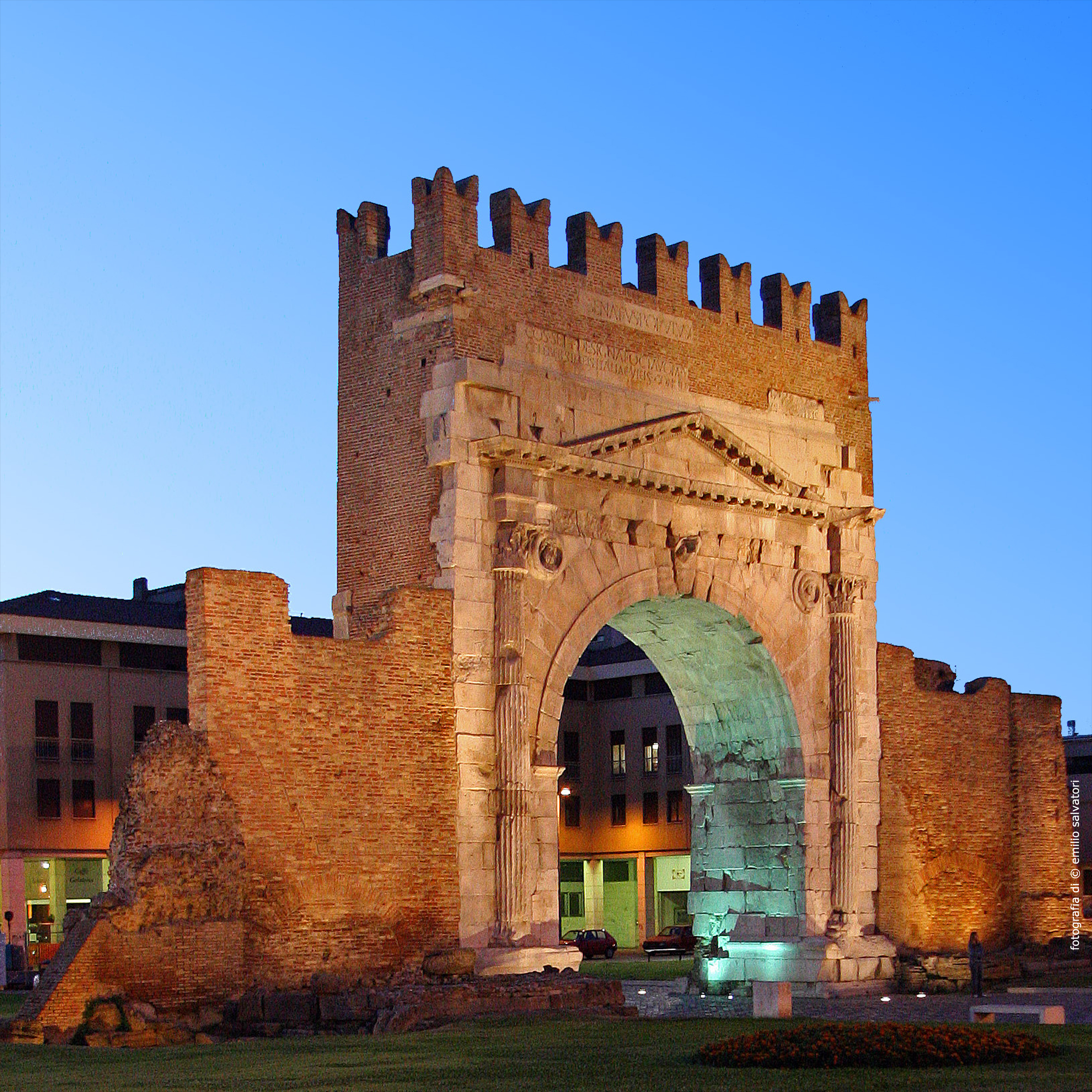 Arco di Augusto This is a photo of a monument which is part of cultural heritage of Italy.